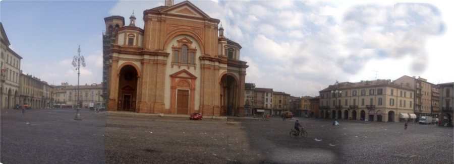 Voghera La piazza del Duomo